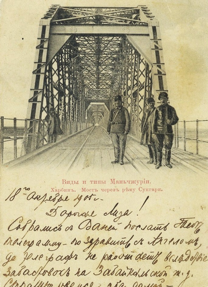 Открытка "Виды и типы Маньчжурии." - "Харбин. Мост через реку Сунгари." Отправлена, предположительно, из Иркутска 18 октября 1905 г. прапорщиком 9-го (европейского) стрелкового полка П.Ф.Смирновым.